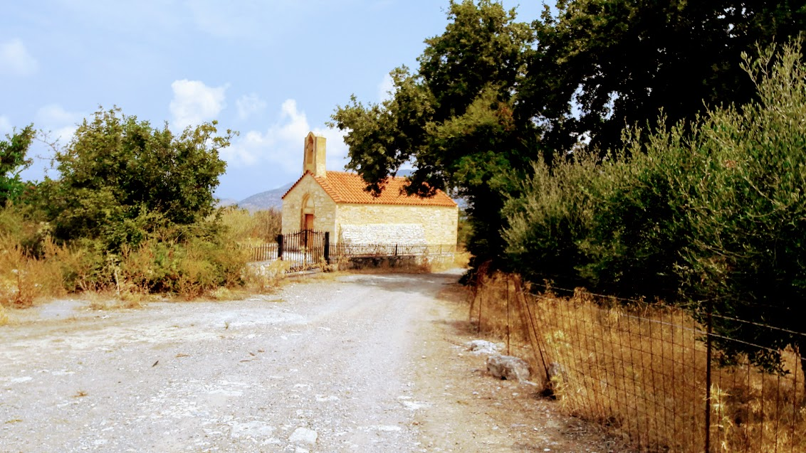 Άγιος Αστράτηγος, Πασαλίτες